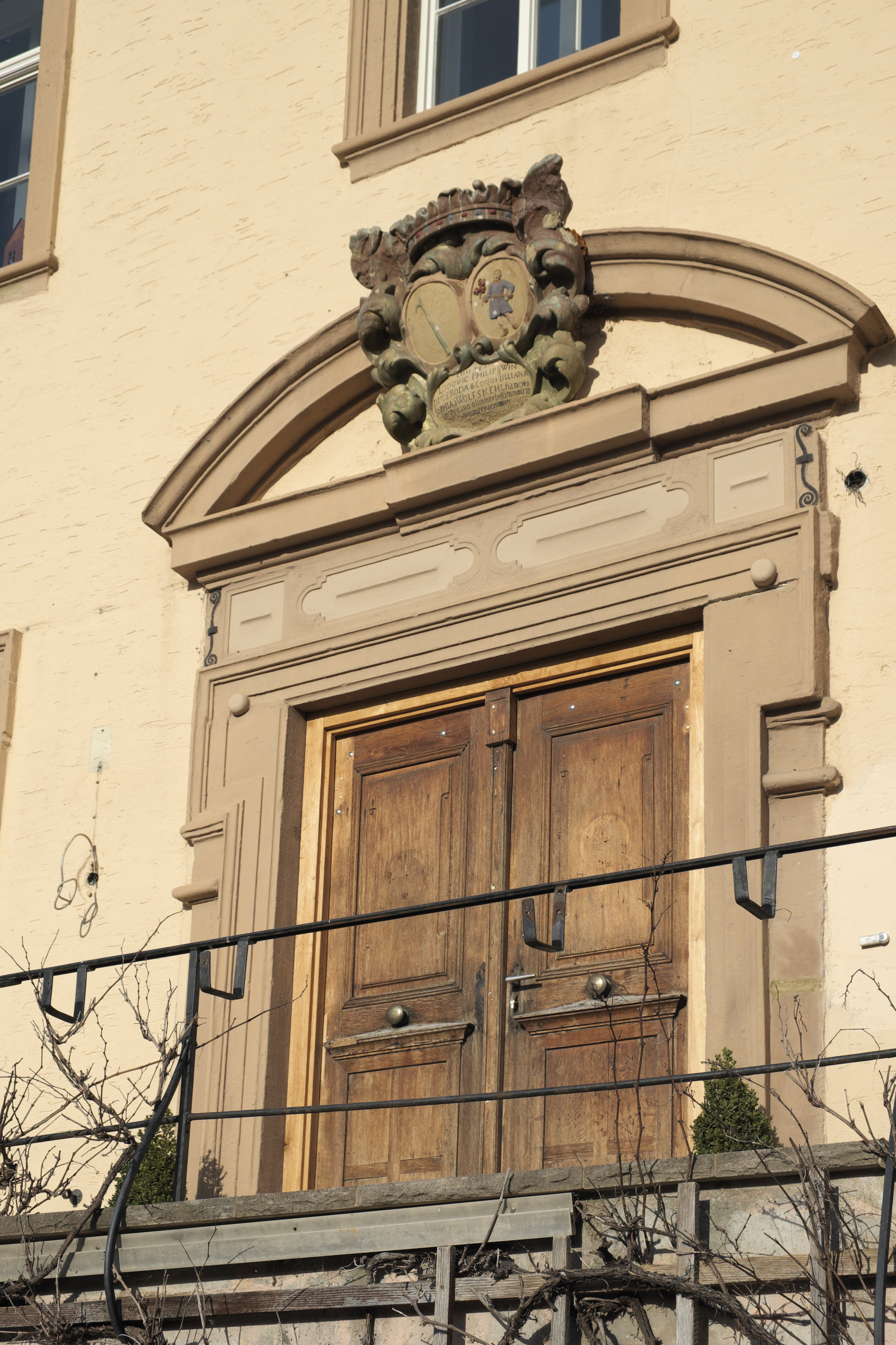 Schloss in Archshofen, einem Ortsteil von Creglingen im Main-Tauber-Kreis (Baden-Württemberg), Eingang mit Wappen